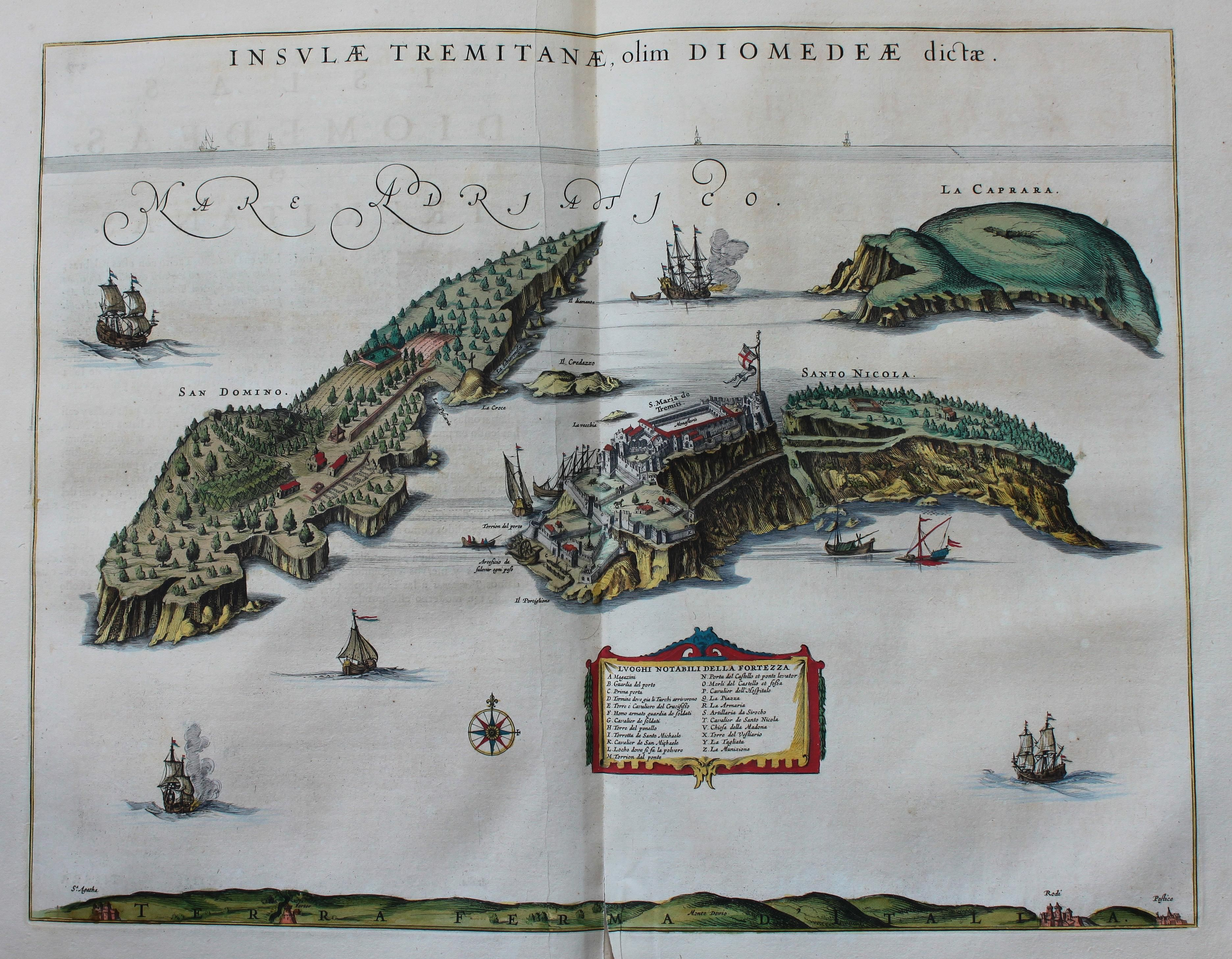 Descripción bibliográfica: Geographia Blaviana. - [Amsterdam : Juan Blaeu, 1659] . - [32], VI, 96 p., 34 f., h. 35a, 35b, 35c, 35d, 36-44 f., 34, [2], 36-40, [2], 43-70 [i. e. 75], [1] f., [20] p. de map., [9] f. de map., [4] f. pleg. de map., [2] f. de plan., [2] f. ge grab. : |bil. ; |cFol. marca major (57 cm.) . - En la dedicatoria a Felipe IV: "Presenta ... El Atlas Universal y Cosmographico de los orbes y terrestre ... Juan Blaeu" . - Título tomado del frontispicio. -- Privilegio fechado en 1659. -Errores de pag. - Sign.: 1, *2, **3, ***-****2, a-e2, A-I2, K1, L-Z2, Aa-Dd2, 4 2, Ee-Ff2, A-I2, K1, L2, M1, N-Y2, Z5, Aa-Dd2, Ee1, A-D2, E-F1, G-I2, K-L1, M-O2, P1, Q-Z2, Aa-Bb2, Cc1, Dd3, Ff-Zz2, Aaa-Bbb2, . - Frontispicio grab. col. -- Incluye un total de 49 il. entre map., plan. i grab. Materia: Atlas - Obras anteriores a 1800 Impresor: Blaeu, Joan, 1596-1673, imp. Lugar de impresión: Holanda. Amsterdam Localización: Vea la ilustración en su contexto Visite también la exposición "Cartografía histórica en la Biblioteca de la Universidad de Sevilla"